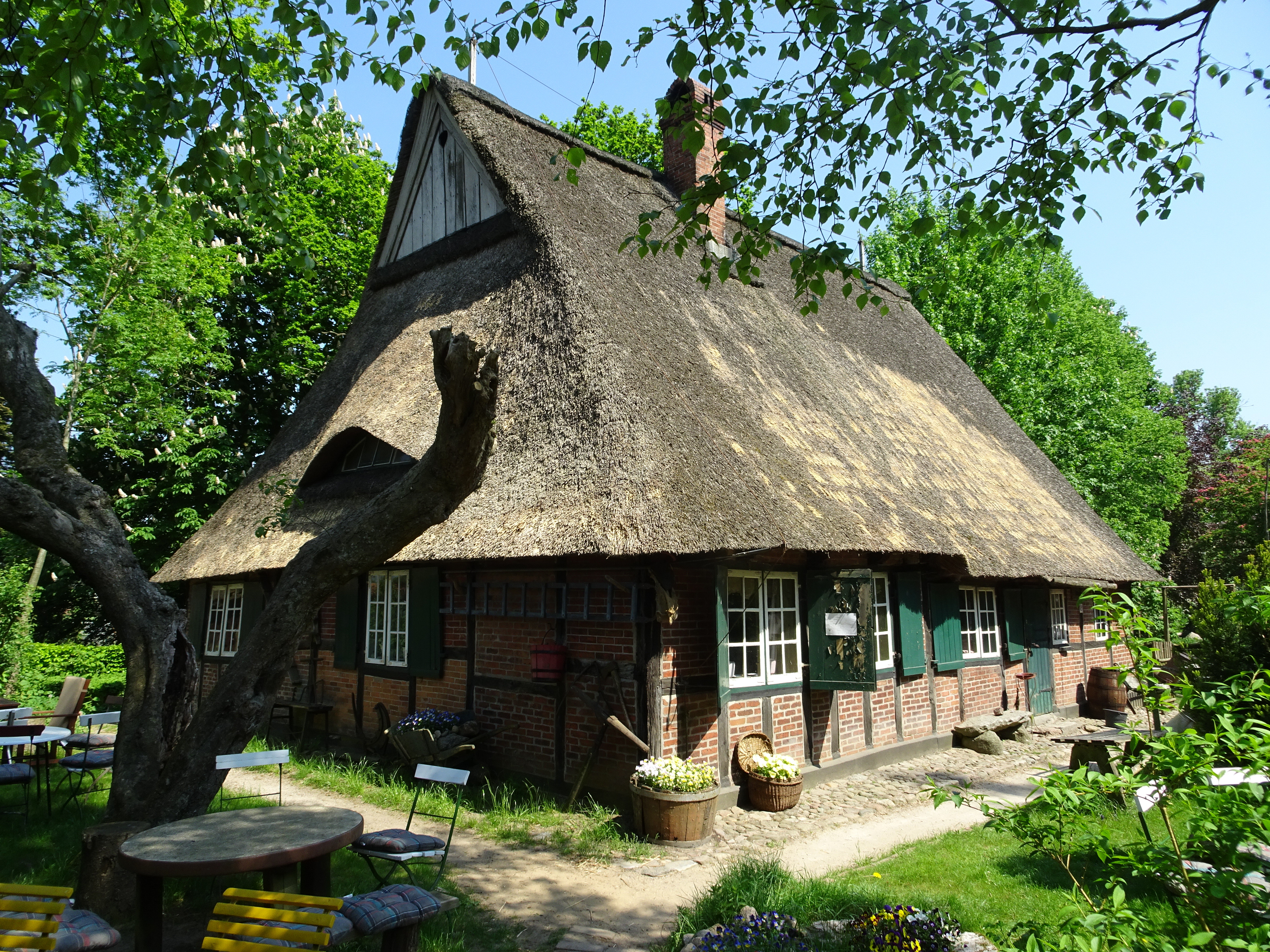 Dat Ole Hus, Kate